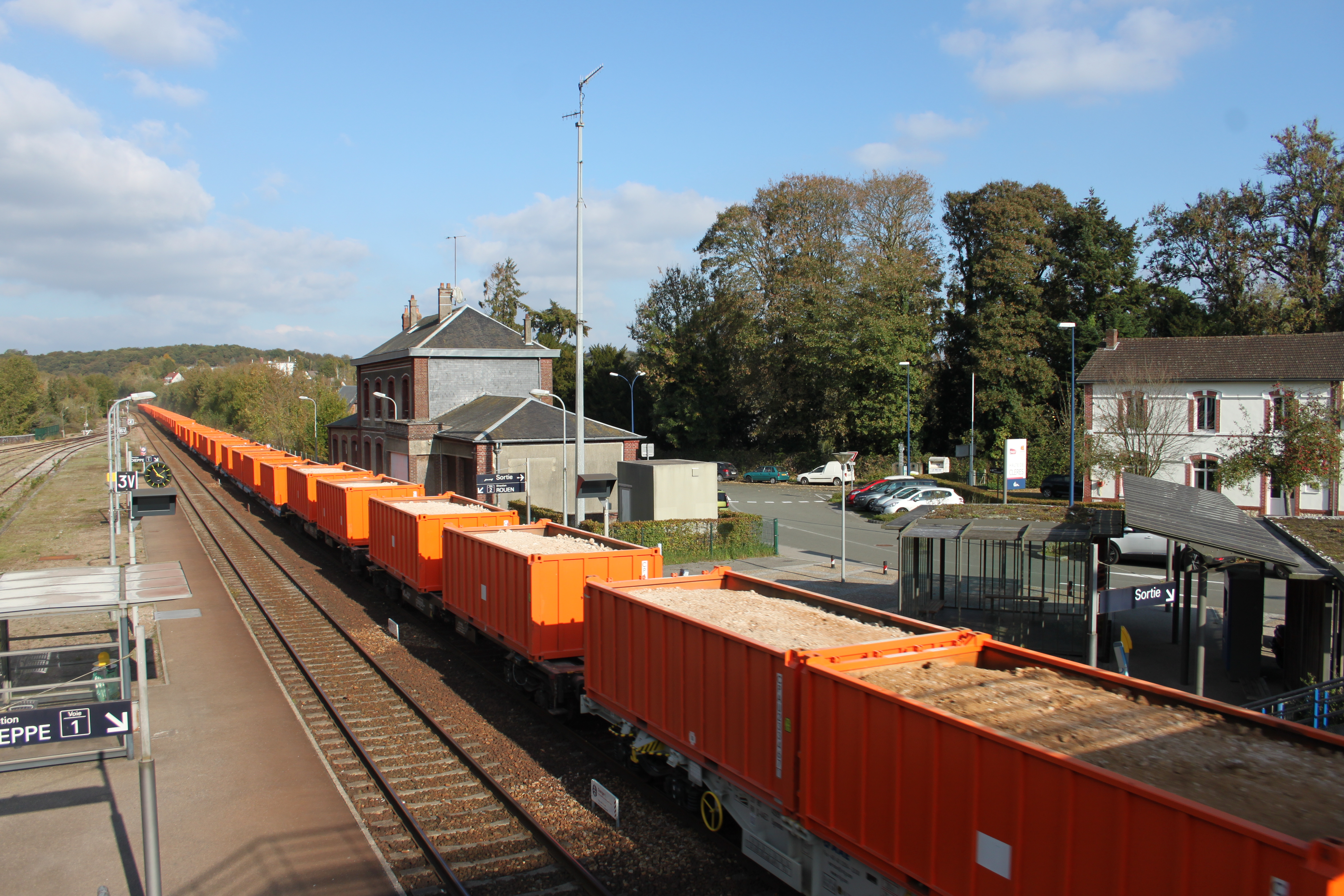 Clères (76), ligne de Malaunay à Dieppe, gare principale et à droite ancienne gare de la ligne Gueures - Clères (passage d'un train de terre provenant de Rouxmesnil-Bouteille pour Rouen, tiré par une unité-multiple composée de deux locomotives diesel Vossloh G 1206).